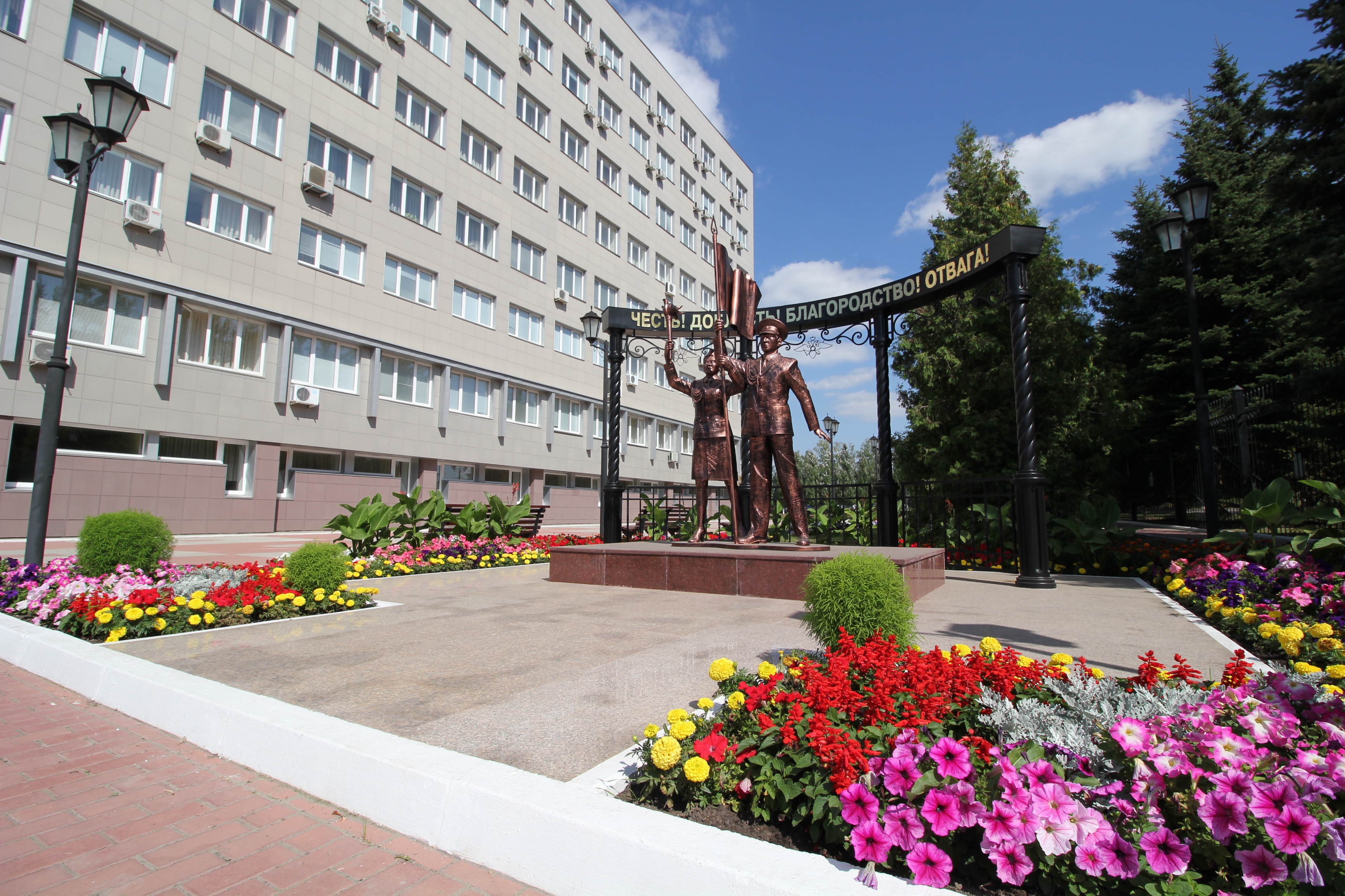 Учебный комплекс №1 КЮИ МВД России